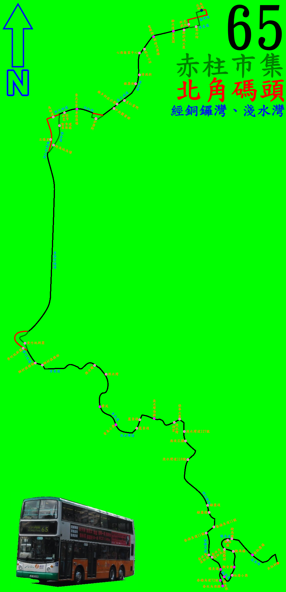 中文（香港）: 新巴65線的走線圖